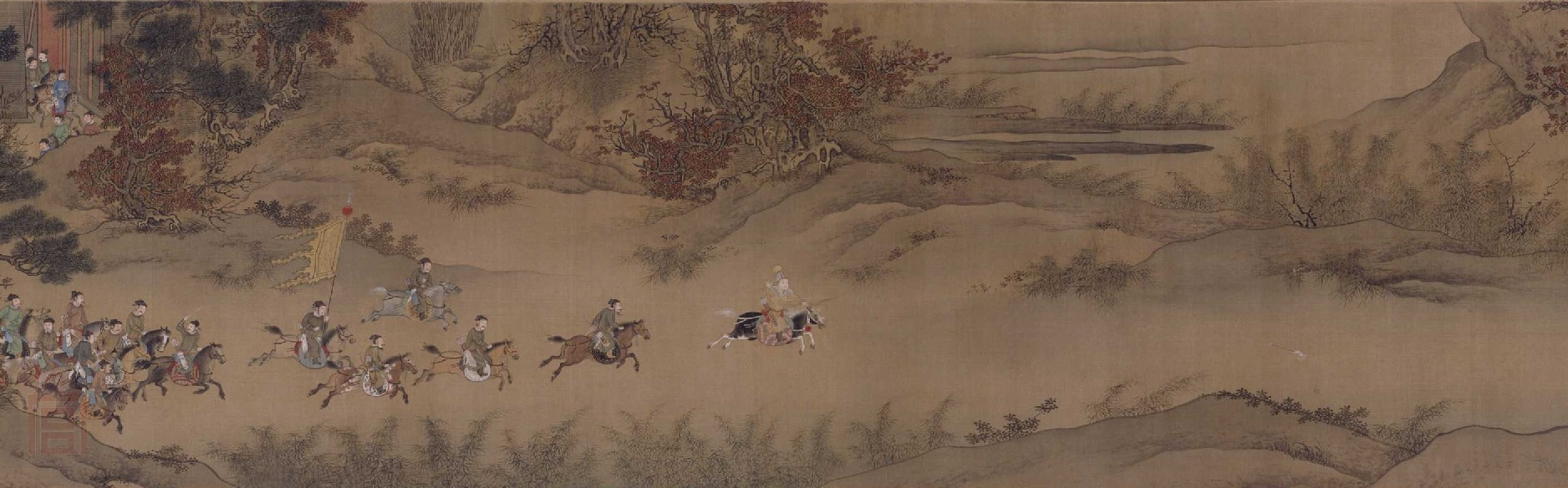 《临萧照中兴瑞应图》中宋代士兵出动图